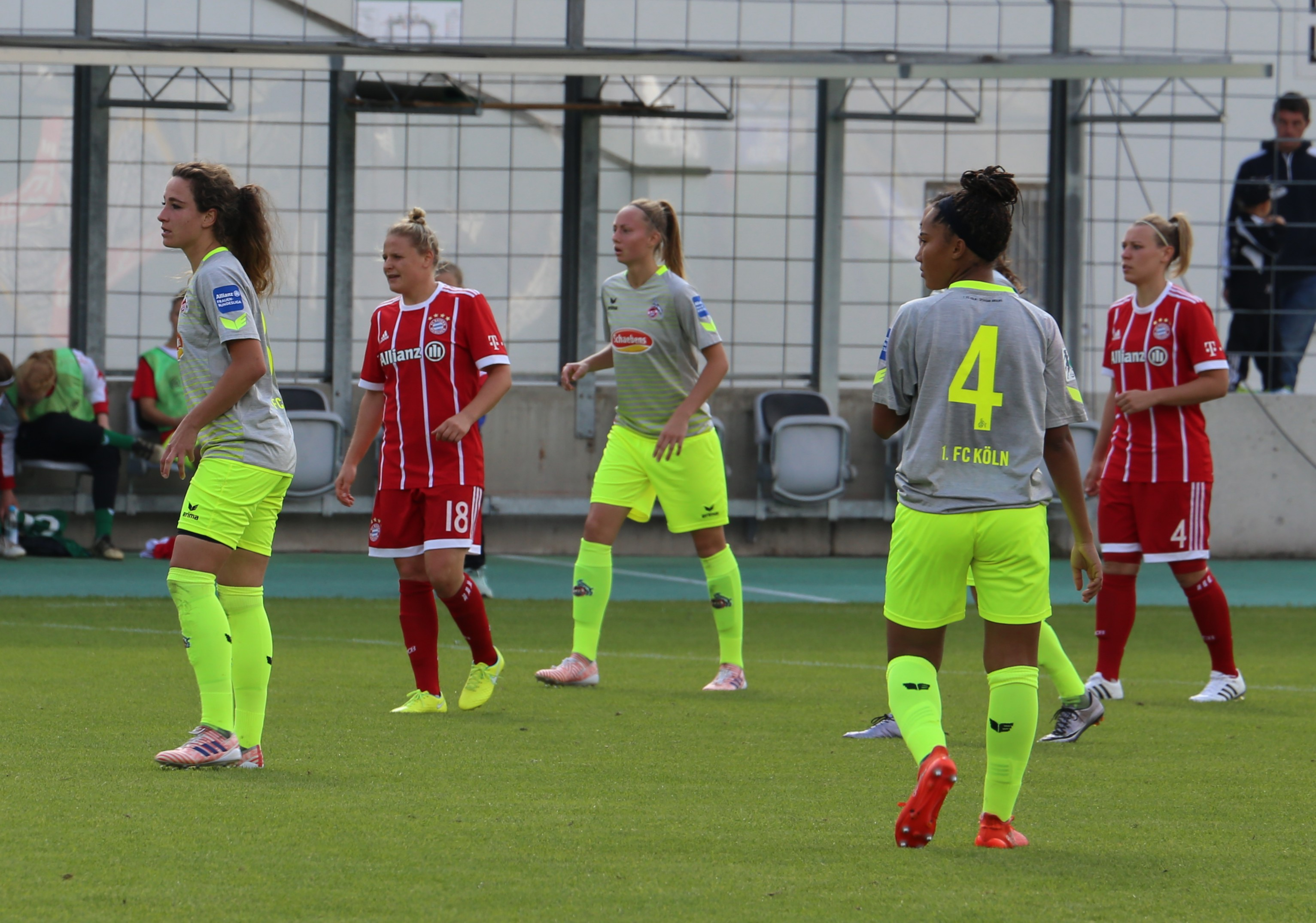 Szene beim Frauen-Bundesliga-Spiel FC Bayern München gegen 1. FC Köln am 24. September 2017 im Stadion an der Grünwalder Straße (Ergebnis war 2:0)